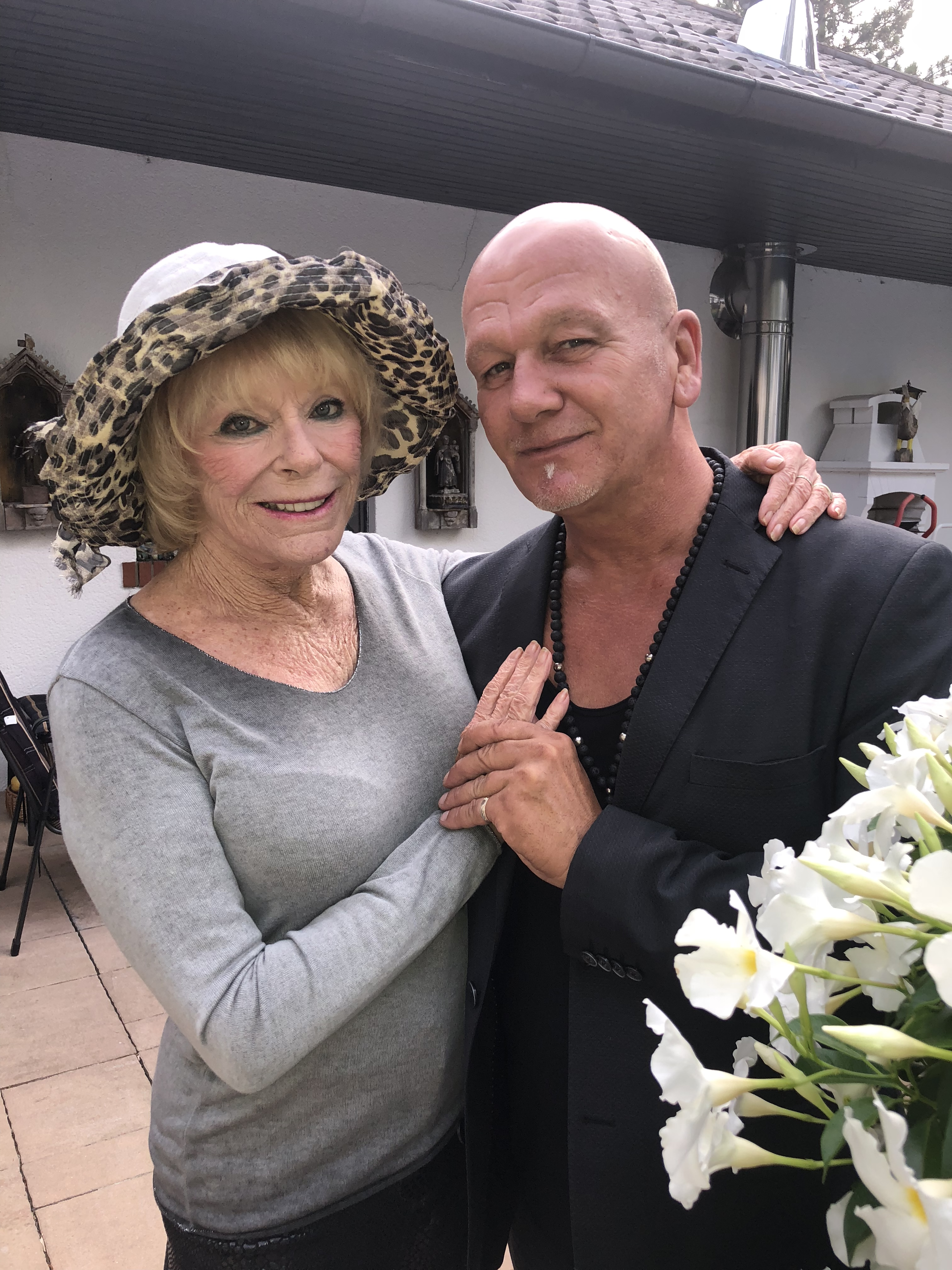 Elke Sommer, Tom Barcal (v.l.)